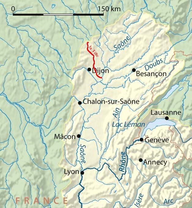 surlignage du tracé de la rivière Tille (affluent de la Saône) - France